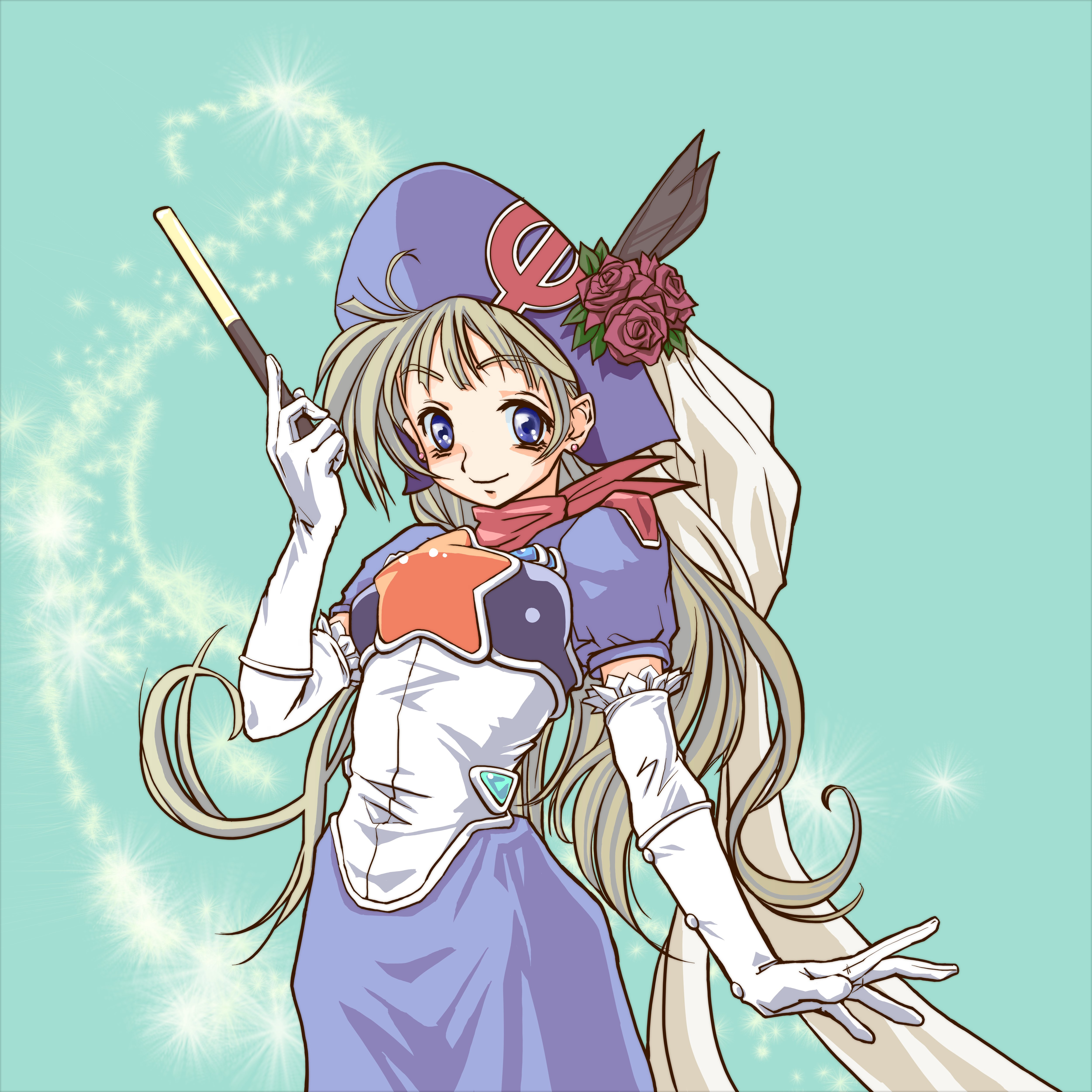 Opera-tan